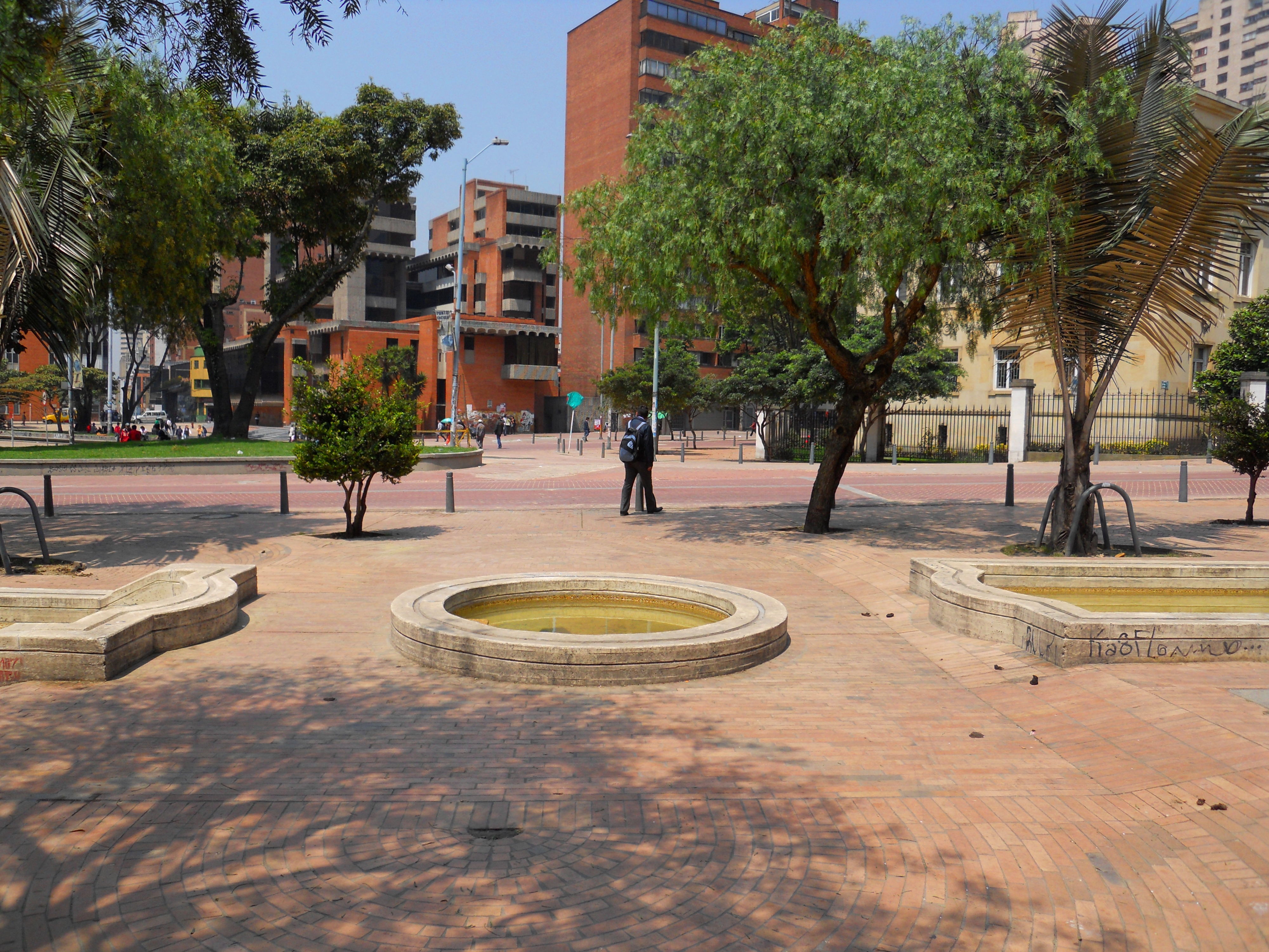 Eje Ambiental hacia el ICFES Bogotá